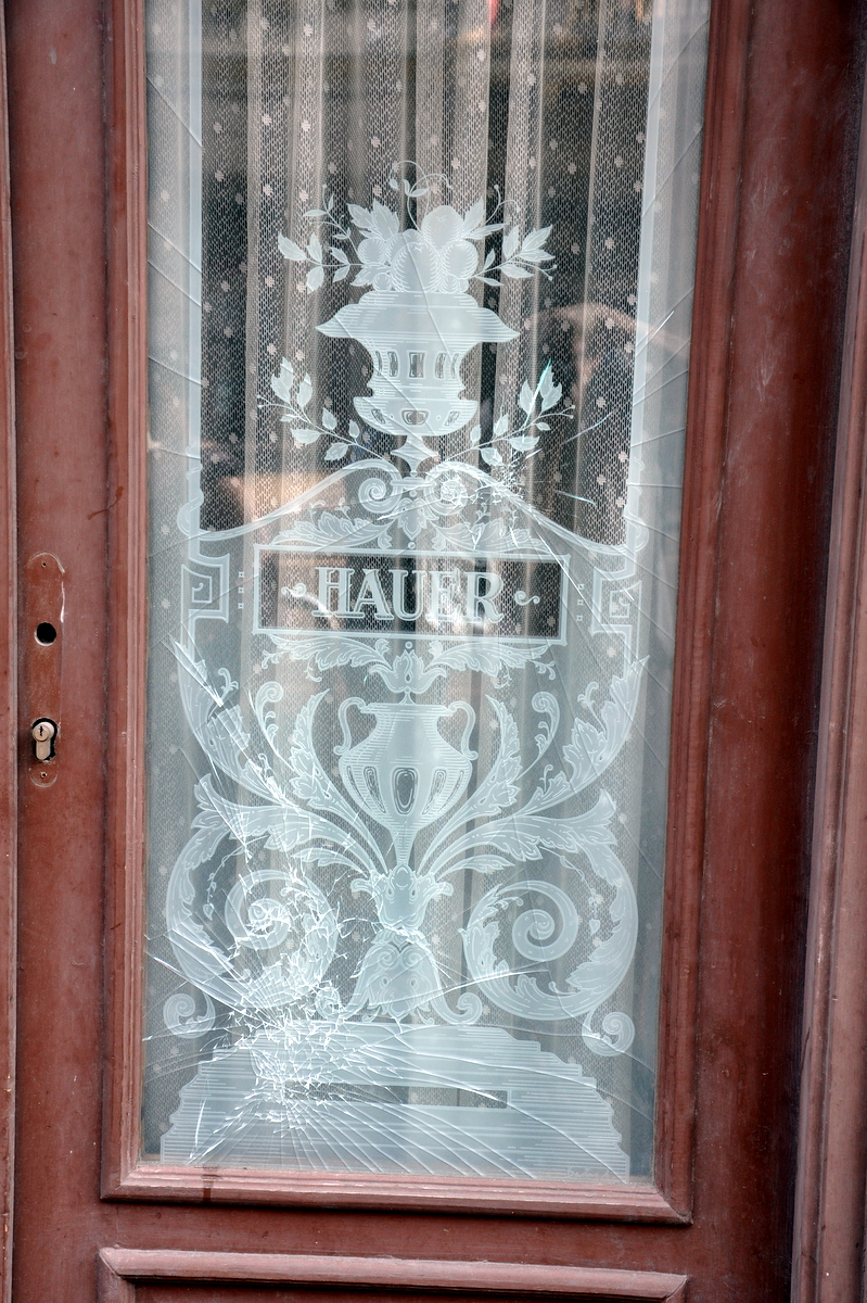 Hauer Cukrászda, Rákóczi út, Budapest This is a photo of a monument in Hungary, Identifier: 959